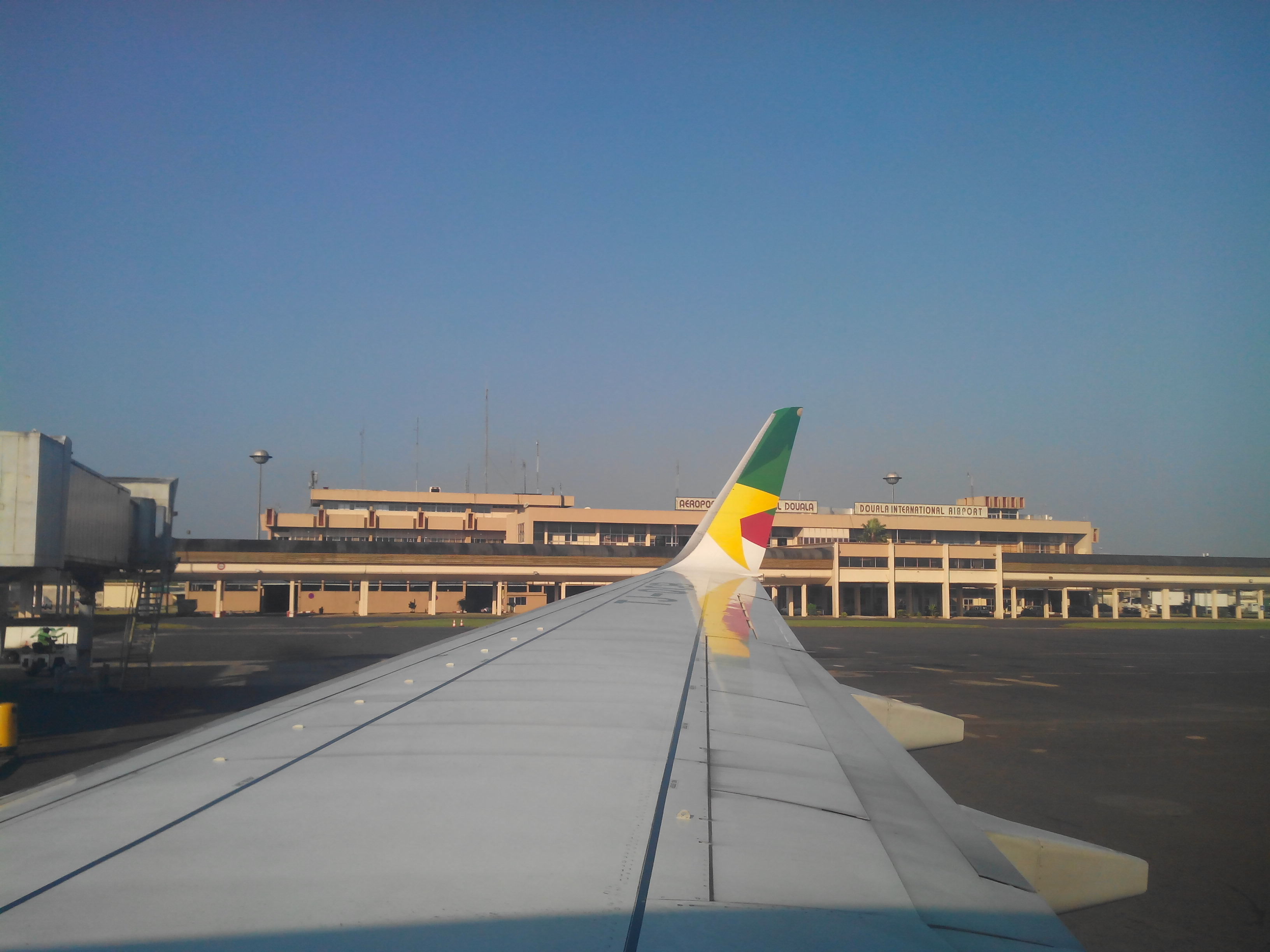 Vue des bâtiments de l'aéroport international de Douala depuis un avion